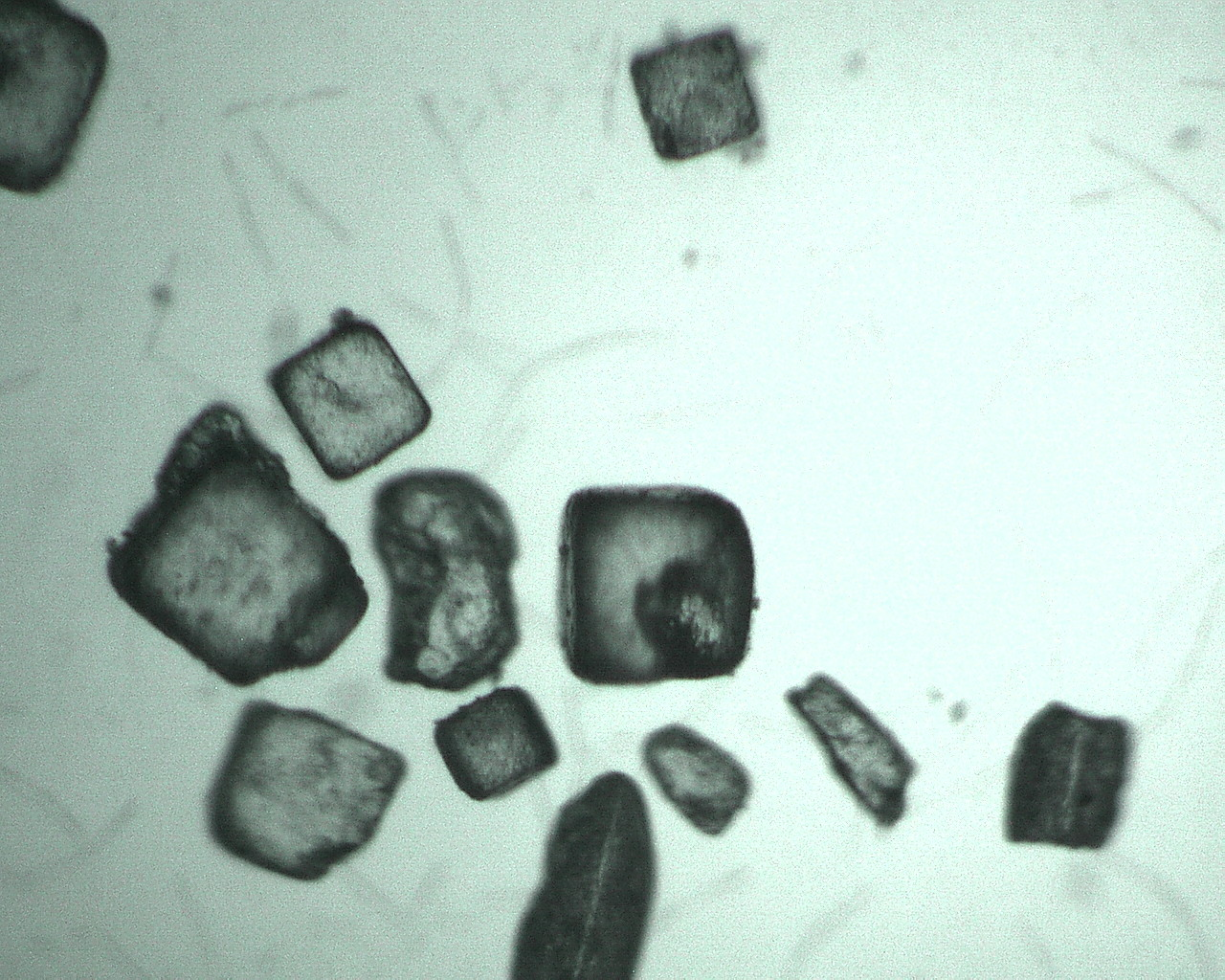 salt, sea-salt